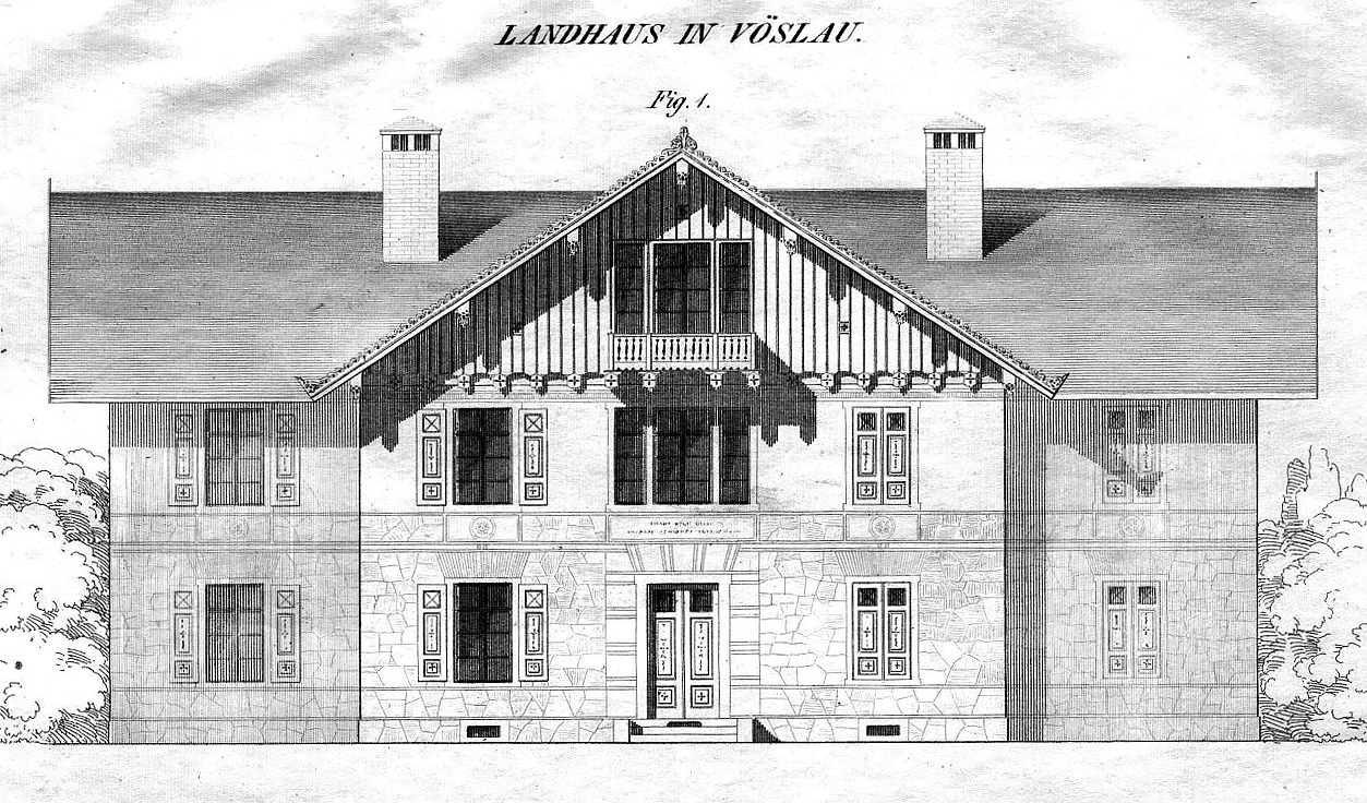 Niederösterreich, Bad Vöslau, Bahnstraße 15, Landhaus „Schweizerhaus“